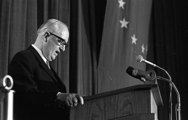 Verleihung des Robert-Schuman-Preises an Prof. Walter Hallstein durch den Rektor der Uni Bonn, Prof. Partsch Information added by Wikimedia users.Hallstein erhielt den nach dem ehemaligen französischen Außenminister benannten Robert-Schuman-Preis